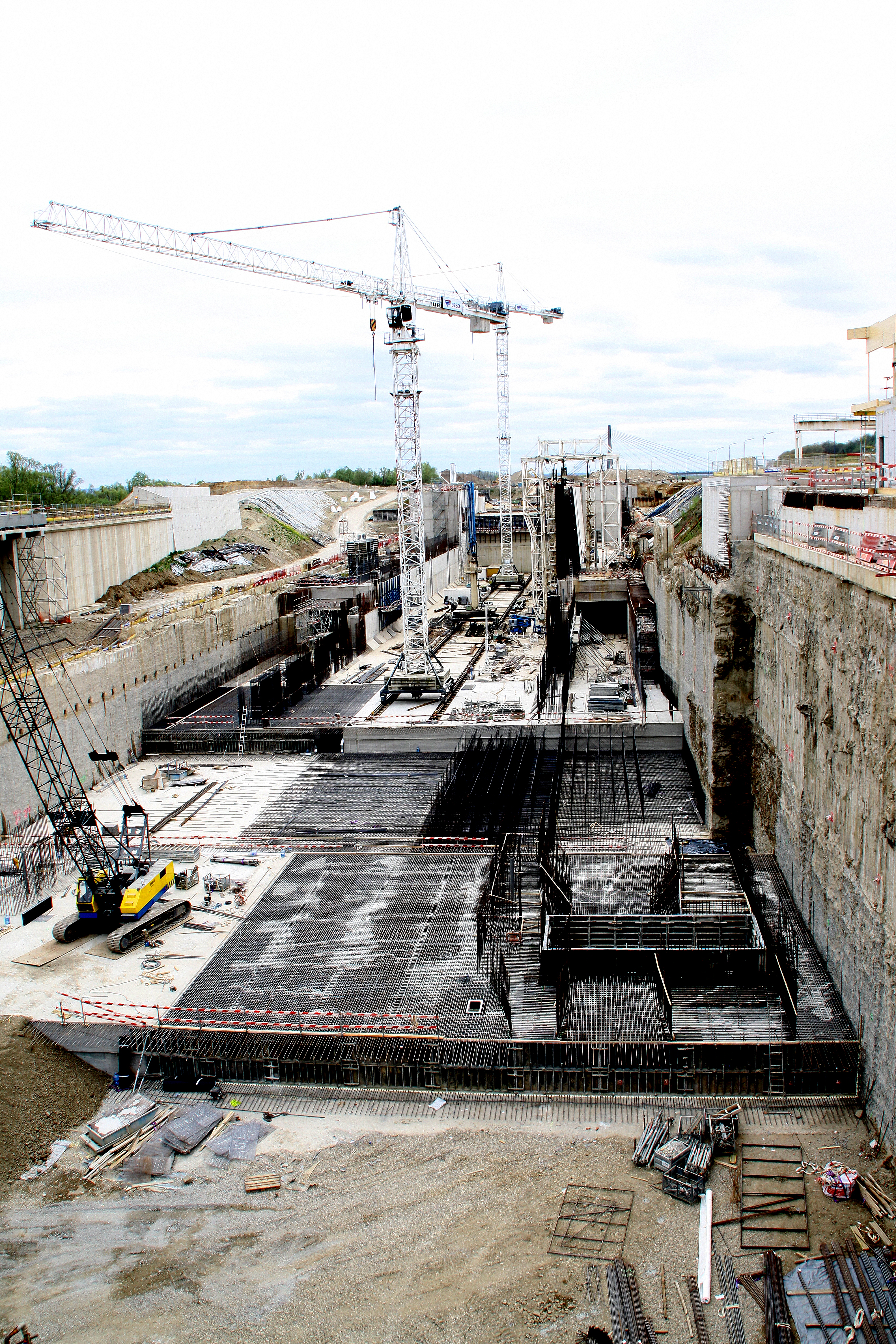 Déi nei Schleis am Abrëll 2014